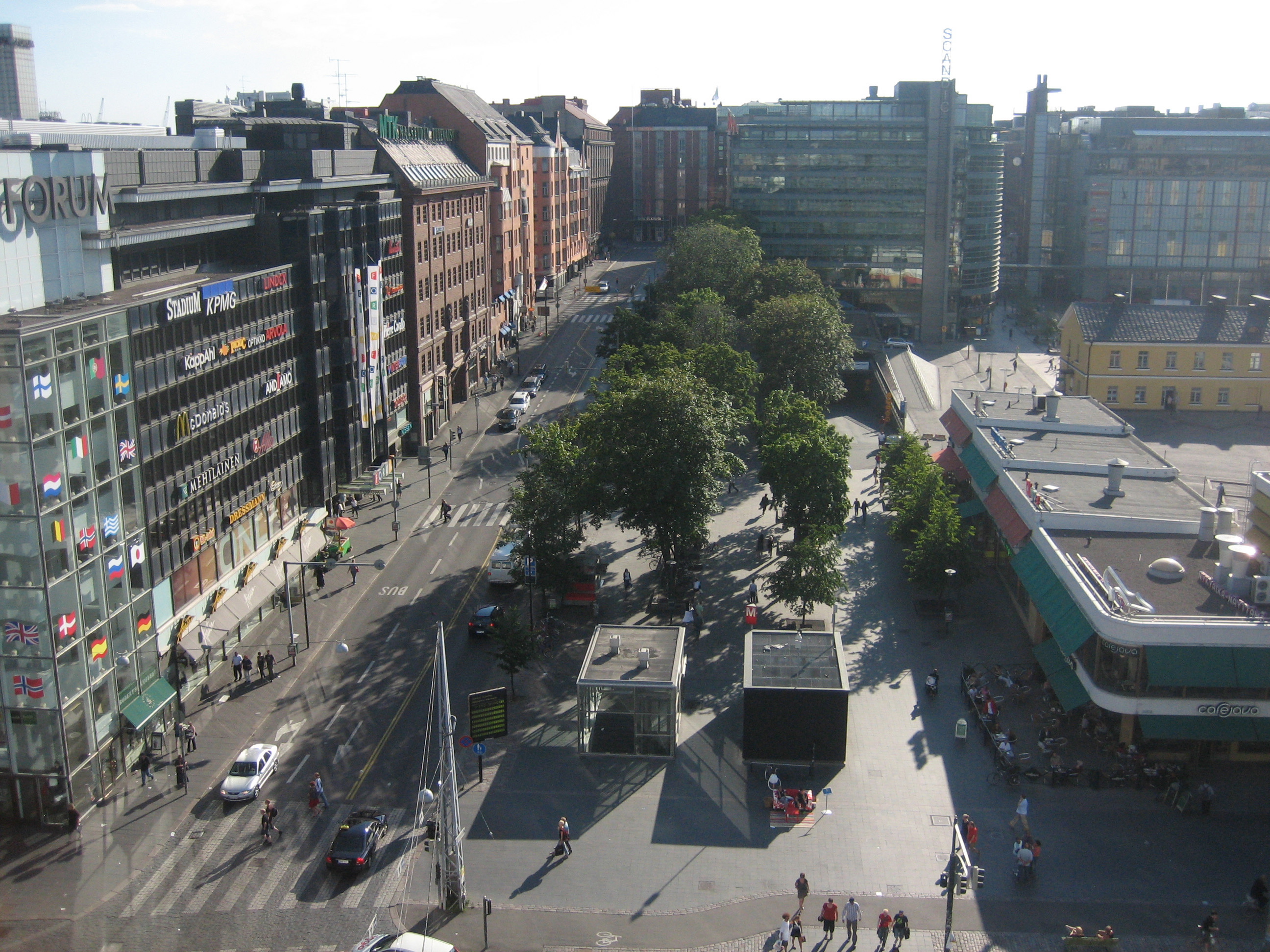 Simonkatu Helsingissä, elokuu 2006.